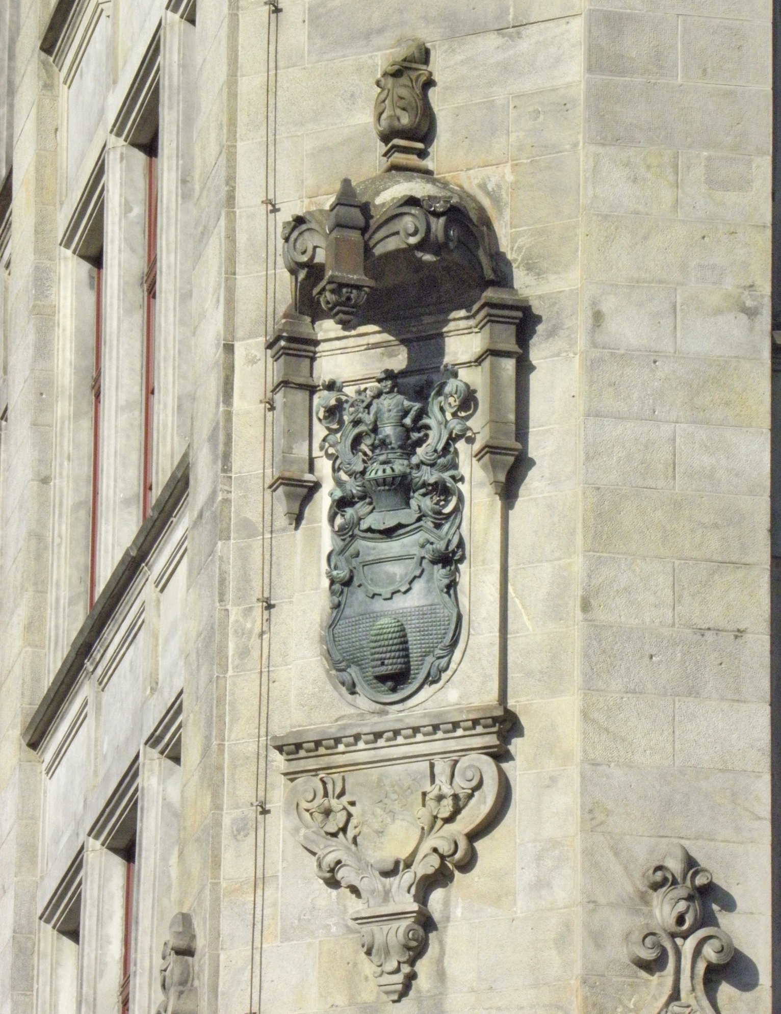 Berlin-Mitte